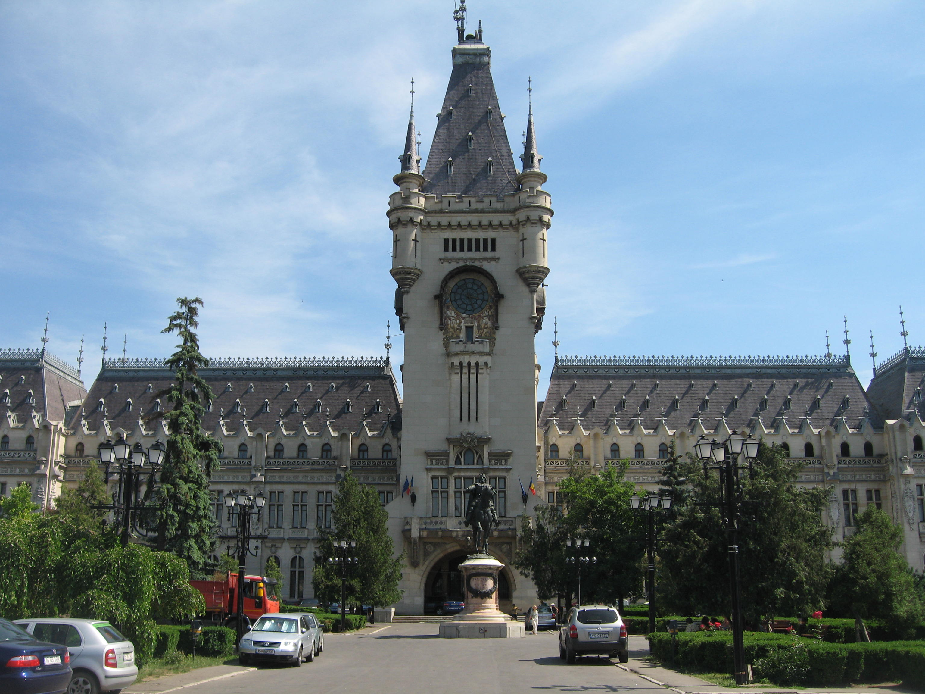 Palace of Culture in Iași